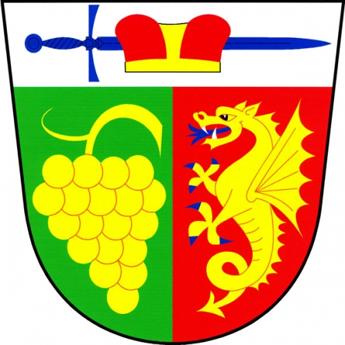 znak, Suchohrdly, okres Znojmo